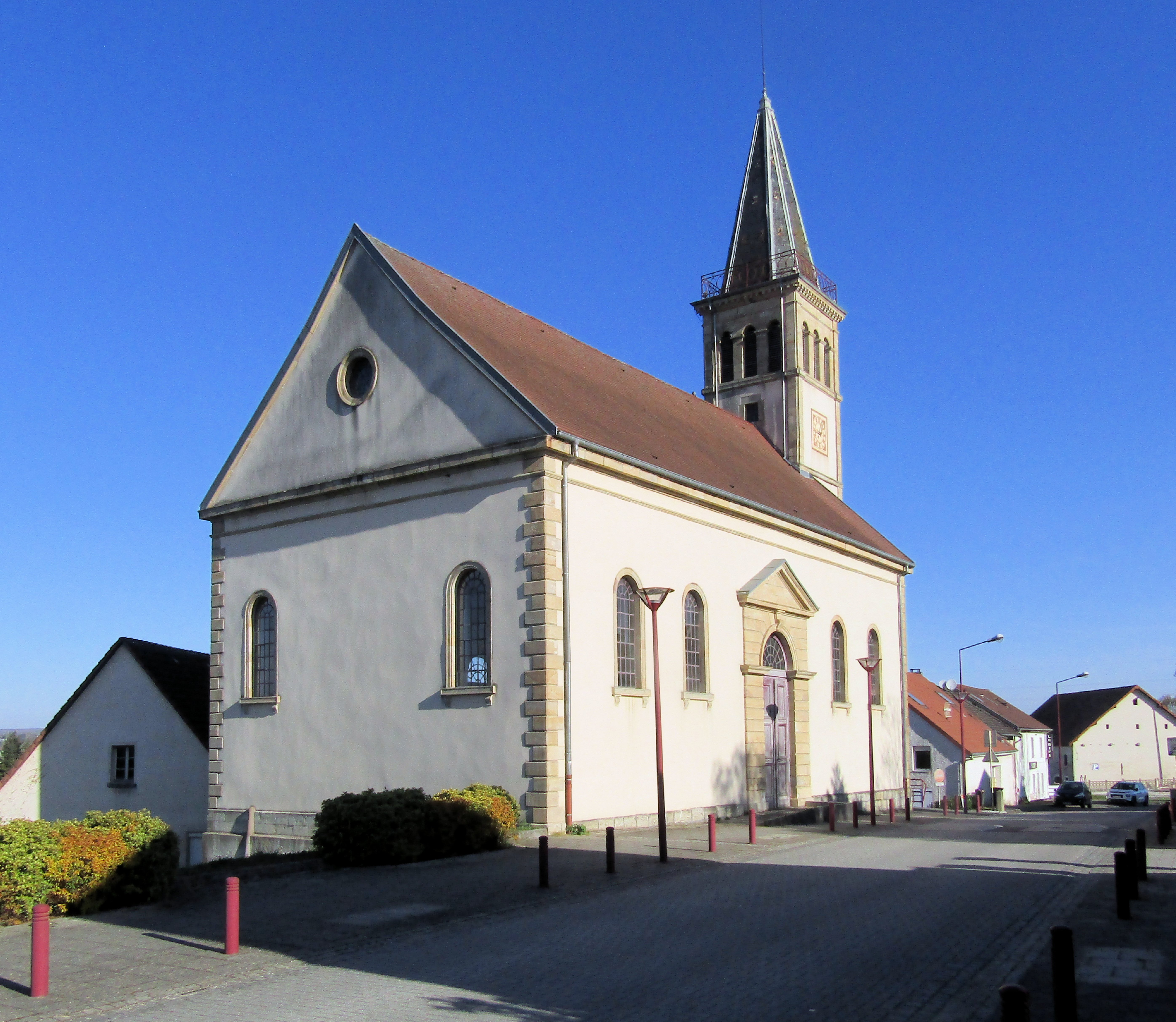 Le temple protestant d'Exincourt, côté nord-est